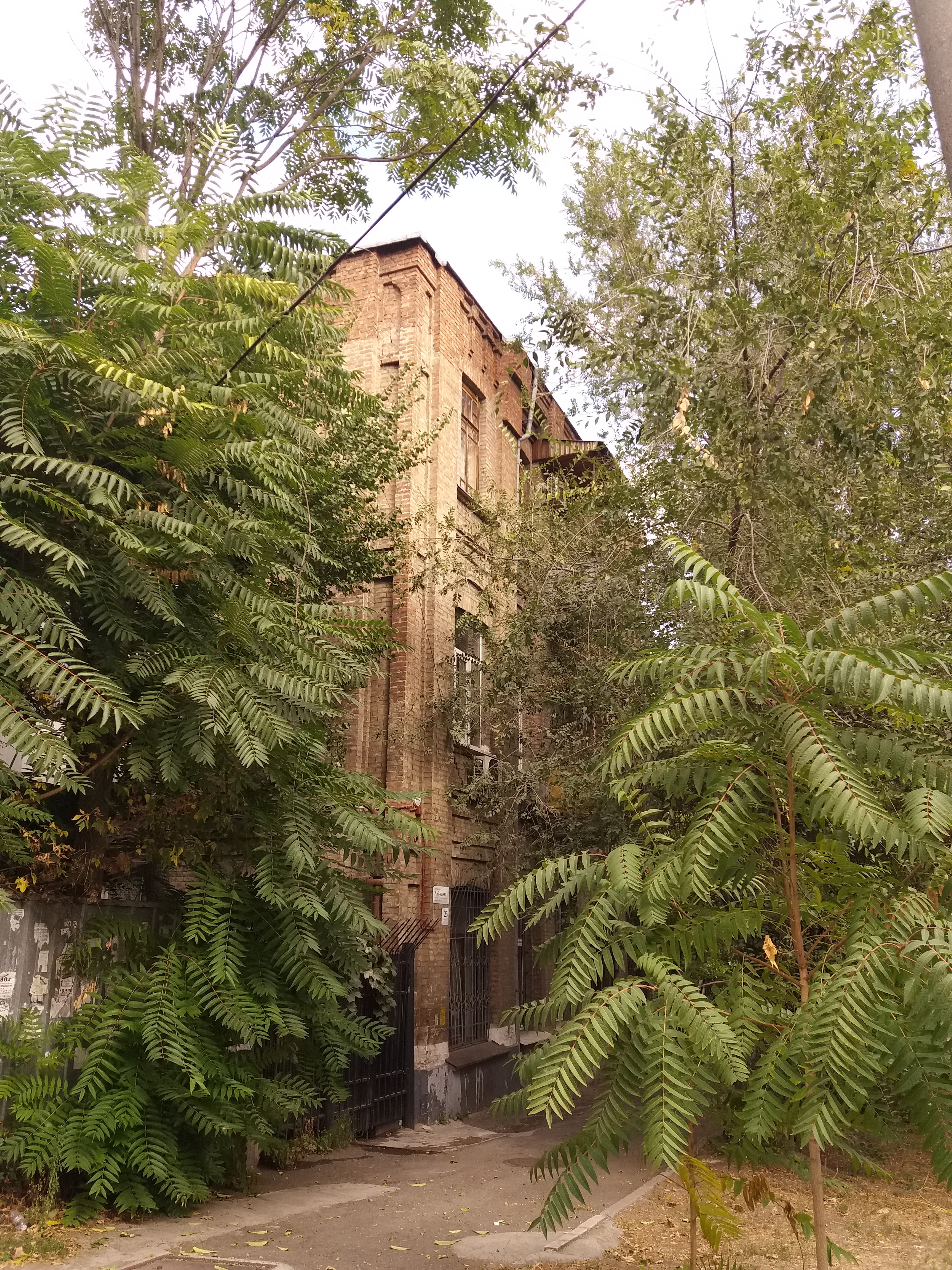 Землемірне училище, Дніпро, вул. Івана Акінфієва (Фучика), 23